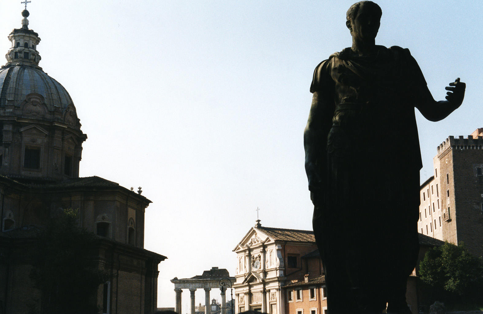 Statue de Jules César devant le Forum romanum